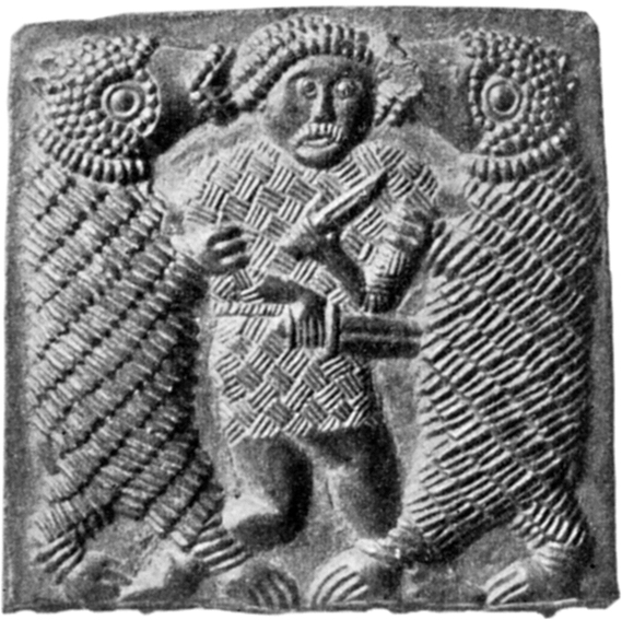 En hjälmbleckspatris med enkrigare som bekämpar två björnar från Björnhovda, Torslunda socken, Algutsrums härad, Mörbylånga kommun, Öland, Kalmar län, Sverige. Fig. 1 ur artikeln "Hjälmar och svärd i Beovulf" av Knut Stjerna ur en festskrift till Oscar Montelius utgiven 1903.